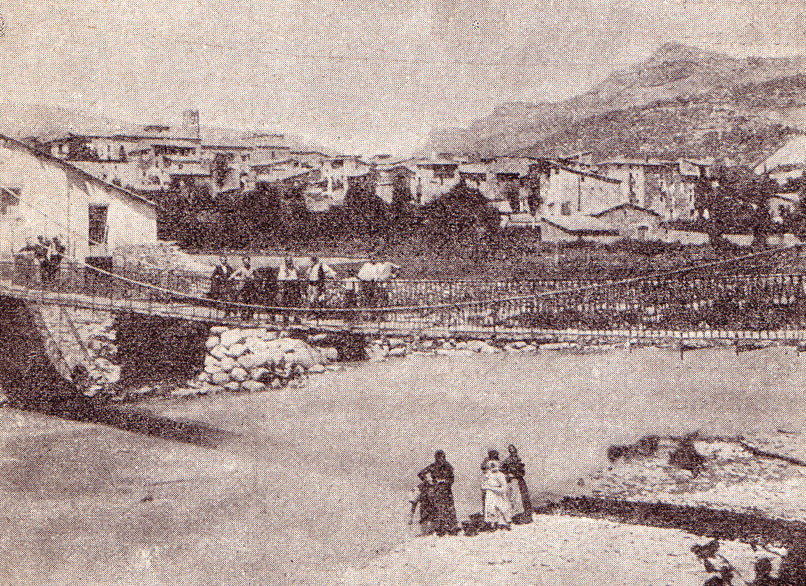 El Pont "de Claverol" sobre la Noguera Pallaresa (El Pont de Suert - el Pont de Claverol, Pallars Jussà)